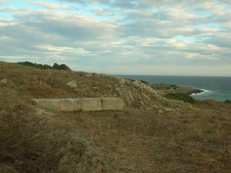 Autore : Luigi Guida Descrizione : Rovine Acropoli Località Saturo (Taranto) Licenza GFDL Licensing Categoria:Immagini esclusivamente in GNU FDL